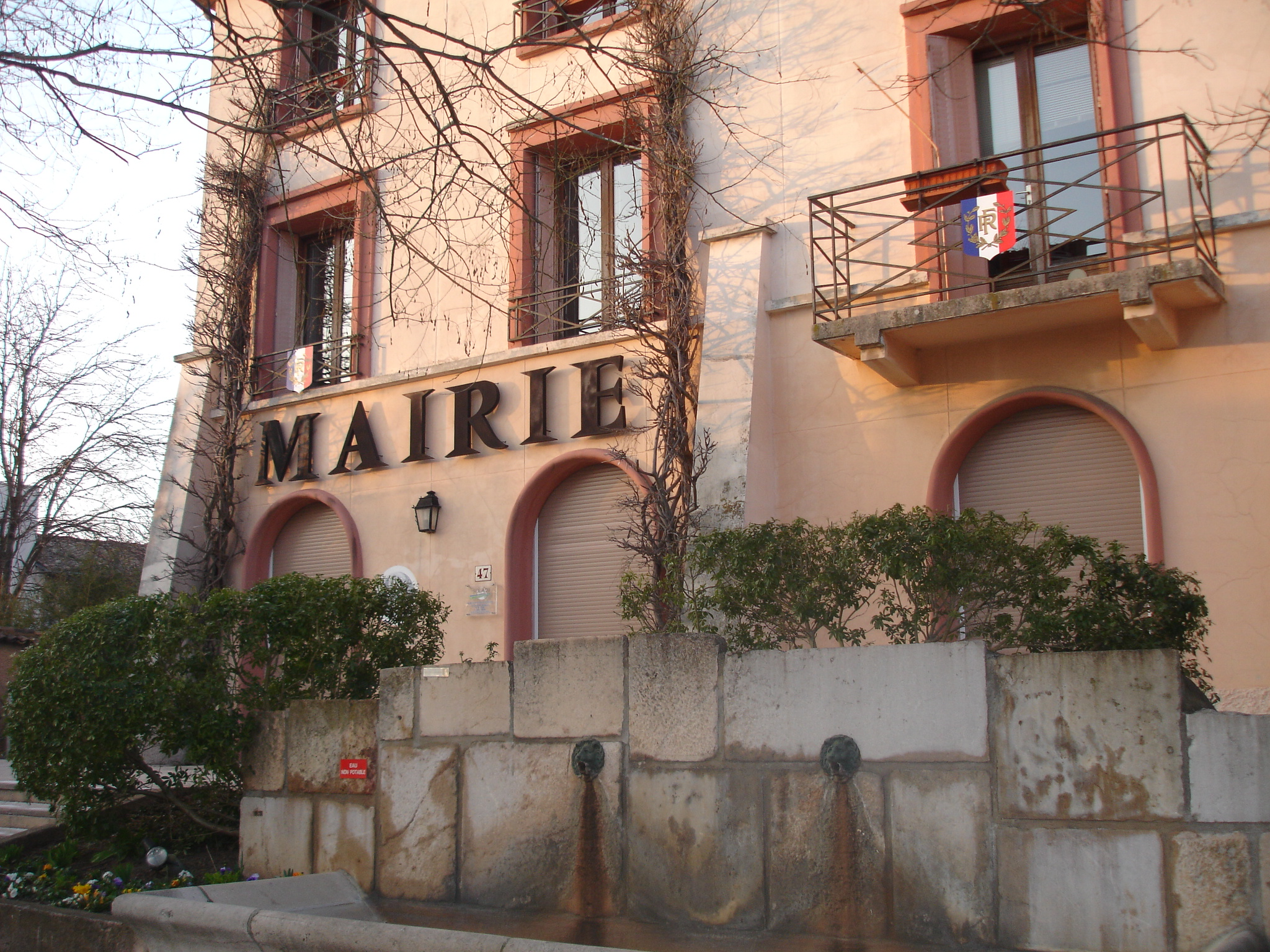 Solaize (69) : La mairie